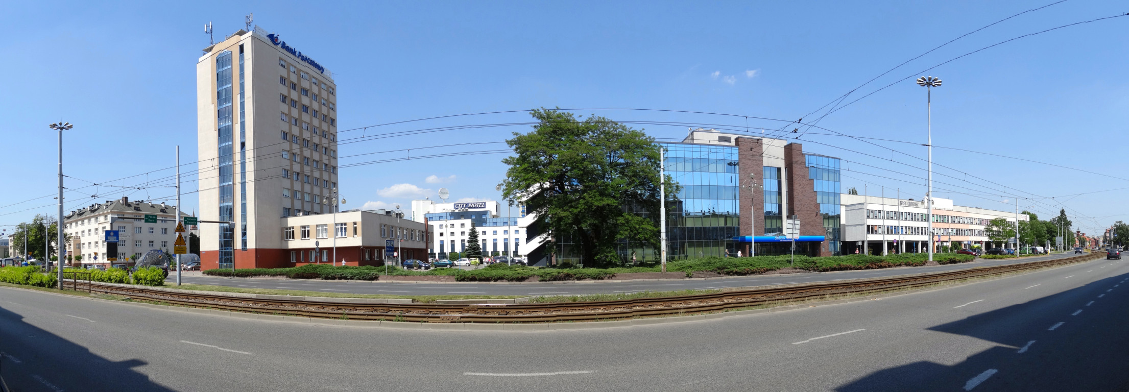 Ulica Jagiellońska w Bydgoszczy